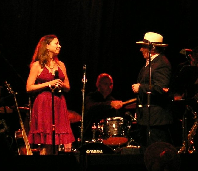 September 12nd 2006, Berkeley